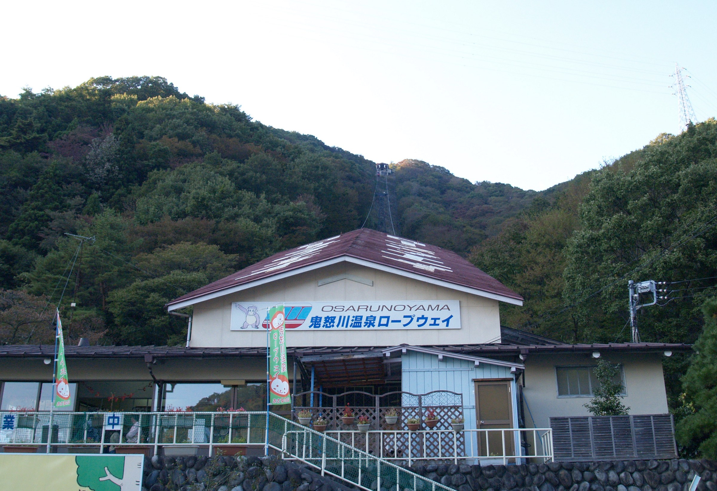 鬼怒川温泉ロープウェイ鬼怒川温泉山麓駅